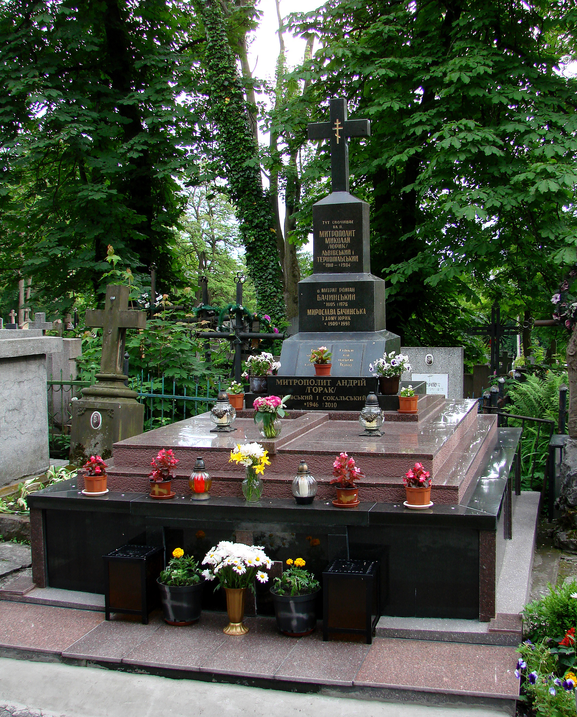 Янівський цвинтар.